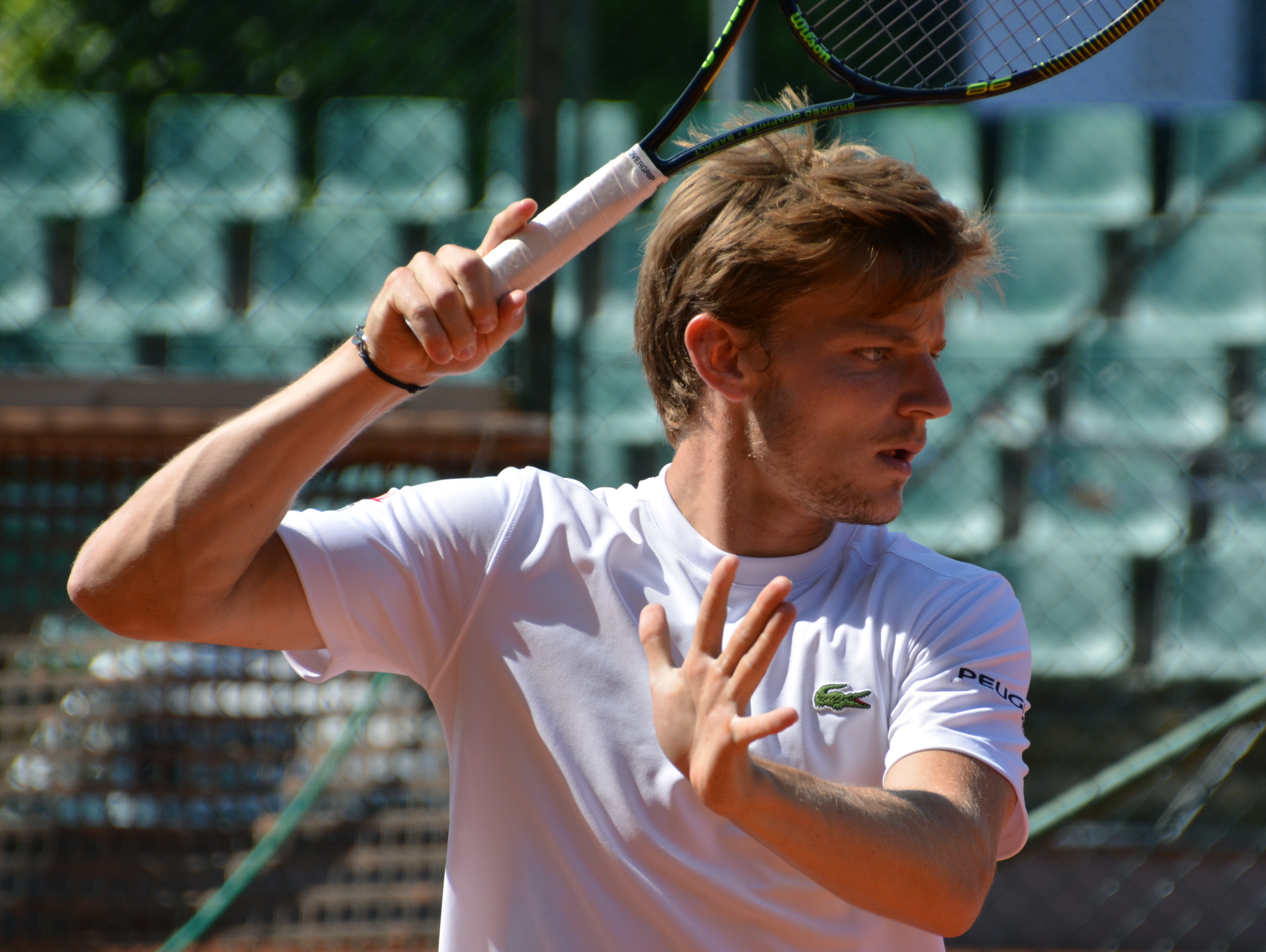 ATP Båstad 2015